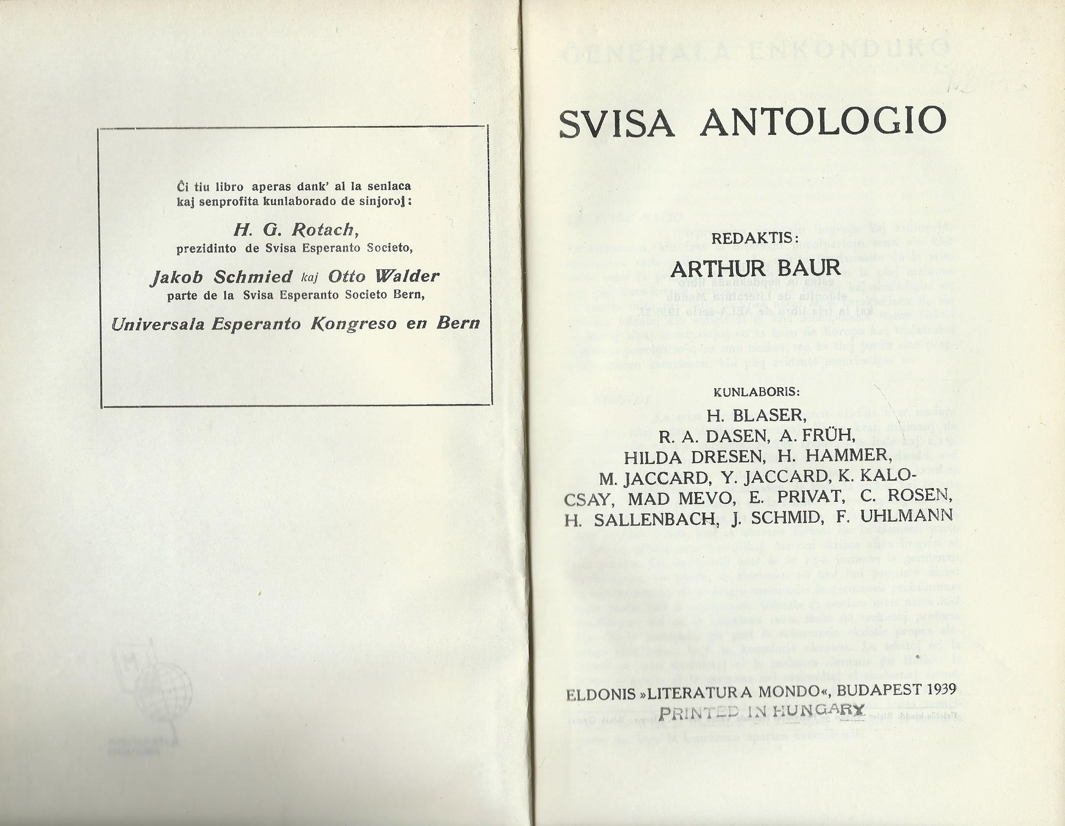 interna kovrilo de "Svisa Antologio", 1939